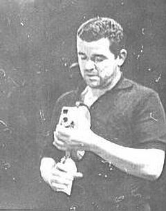 Проф. Константин Джидров, Експериментален театър '64